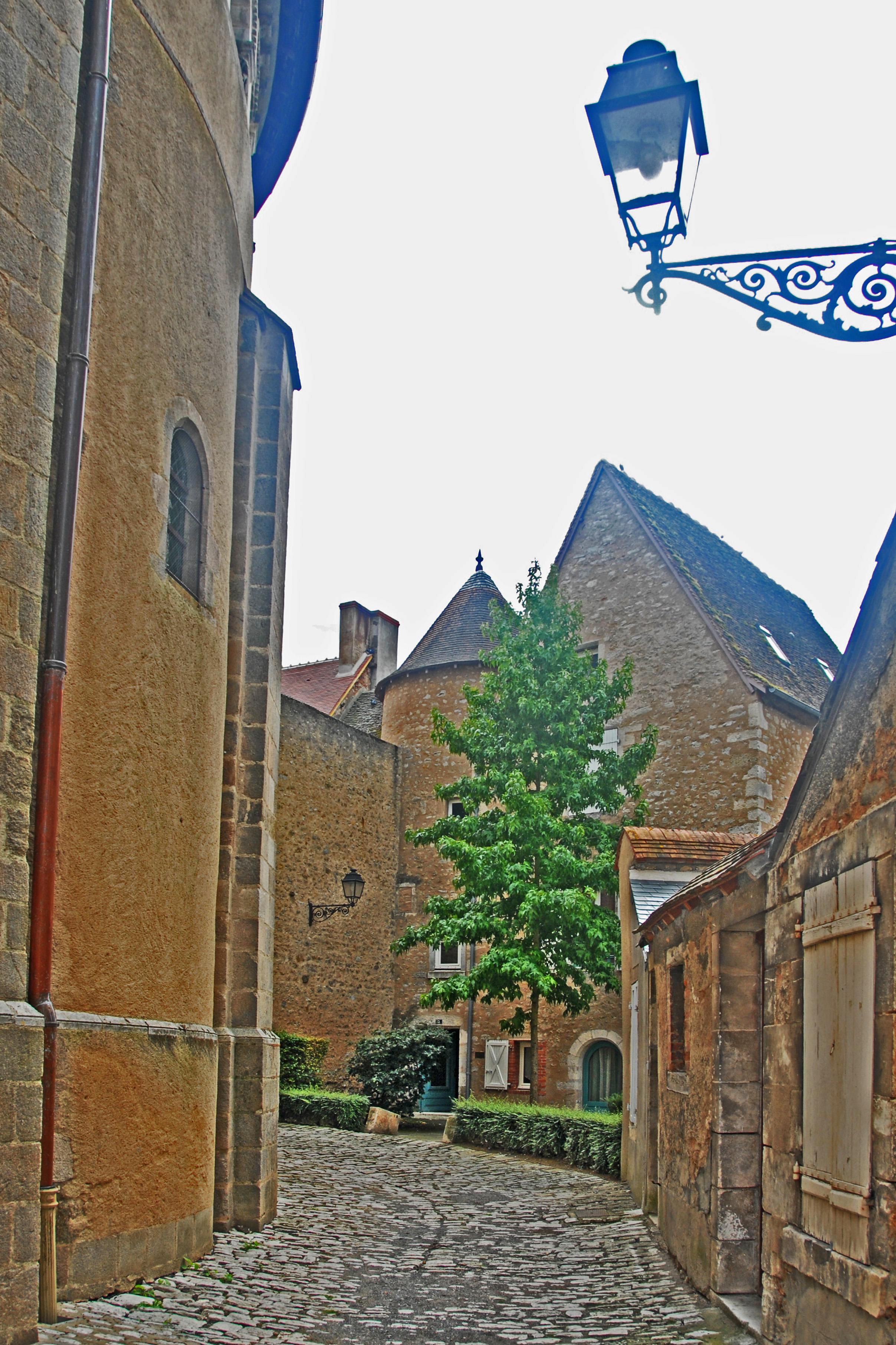 Neuvy_St.-Sépulcre, Rotunde, Gasse im Westen, Burgreste